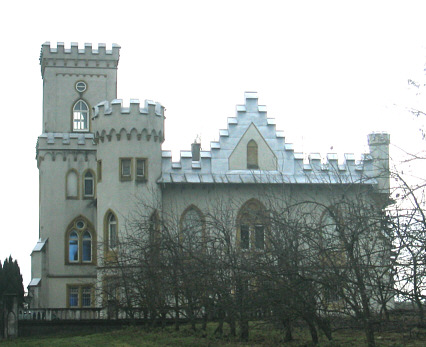 Schloss Benzenhofen in Berg (Schussental) bei Ravensburg